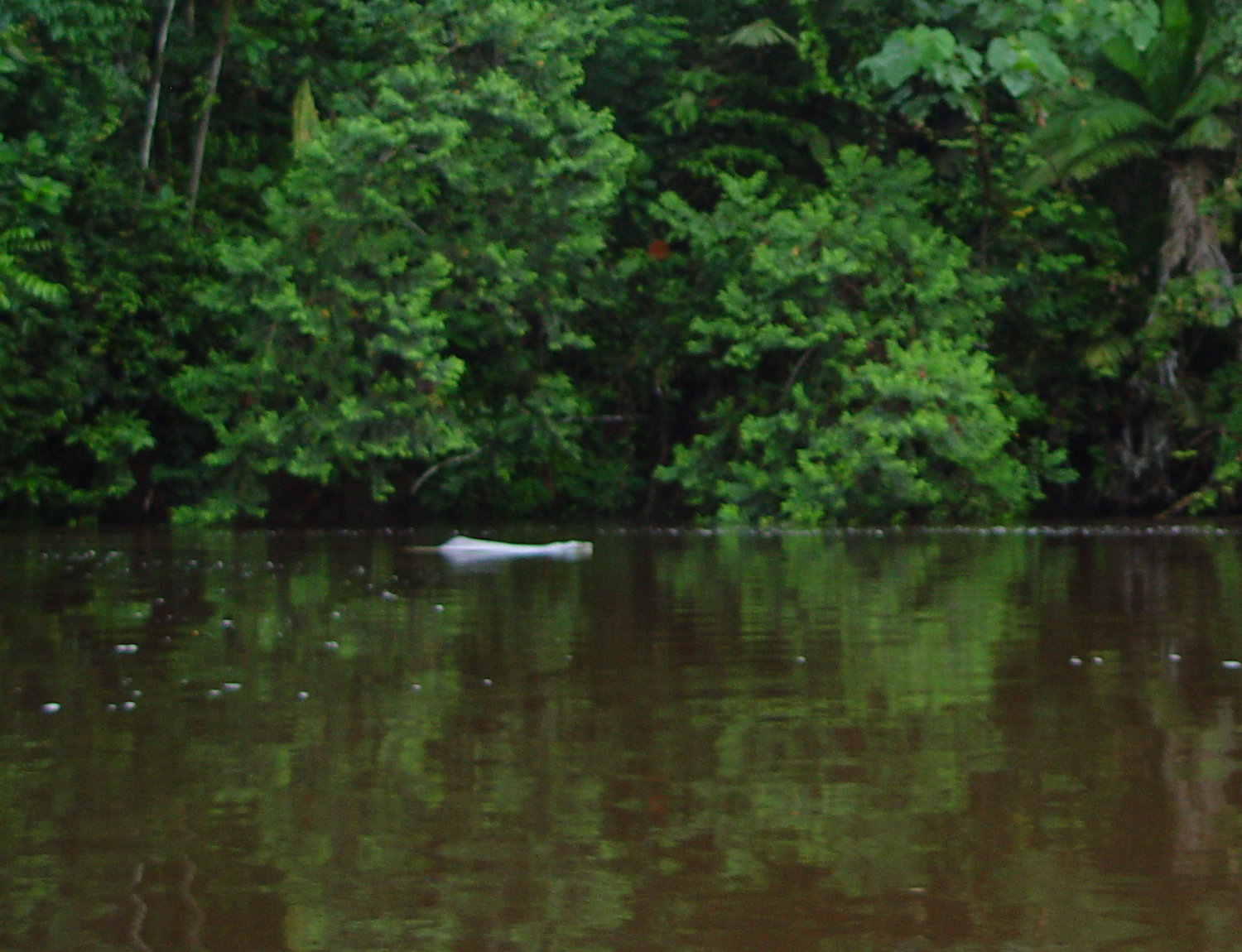 Inia geoffrensis, Putumayo, Sucumbios, Ecuador.